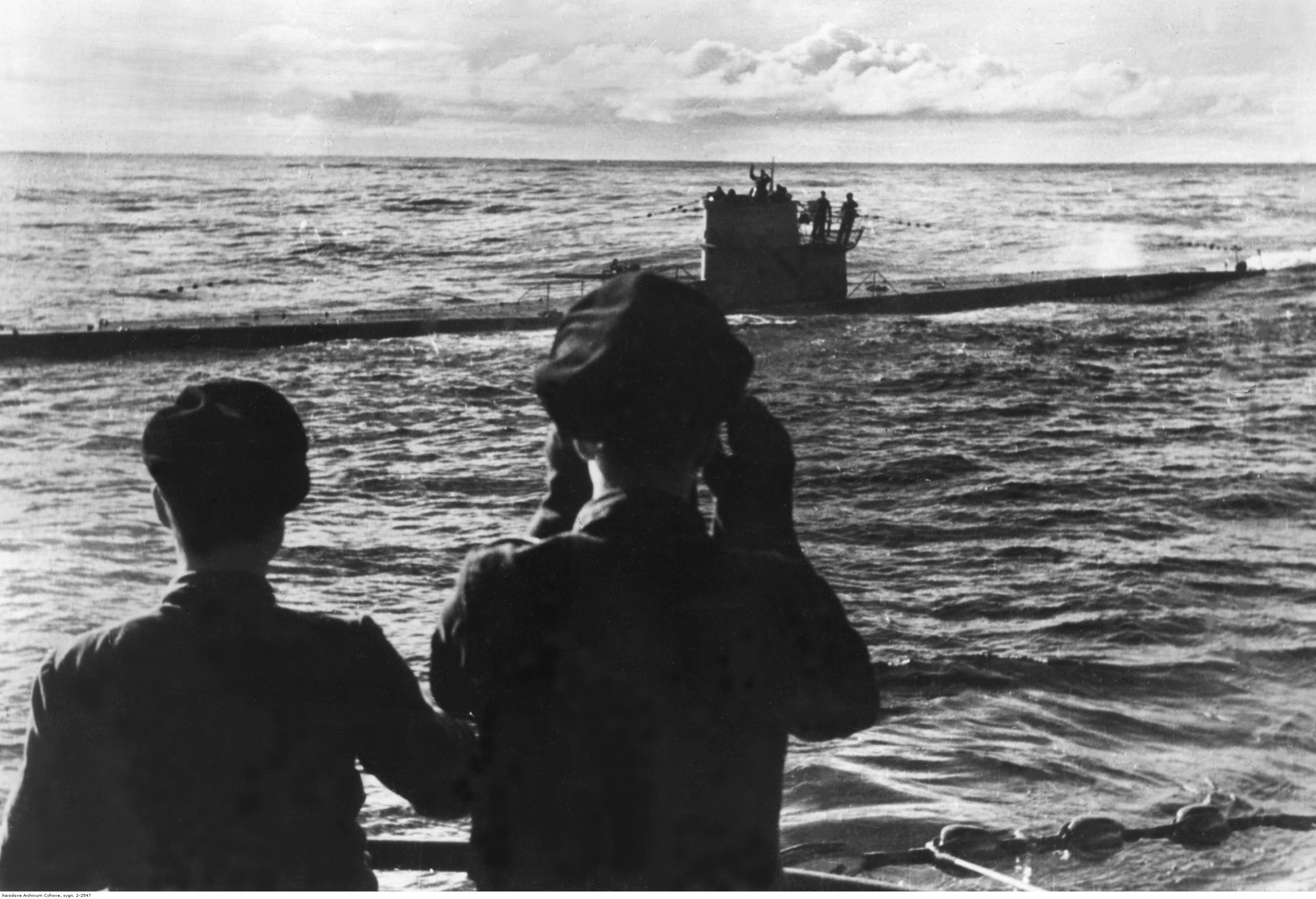 Niemieckie okręty podwodne (U-Booty typu VII) na północnych wodach USA. Widoczny U-588 dowodzony przez kapitana Guntera Krecha. Uwaga - w opisie jest błąd, gdyż Günther Krech dowodził U-558